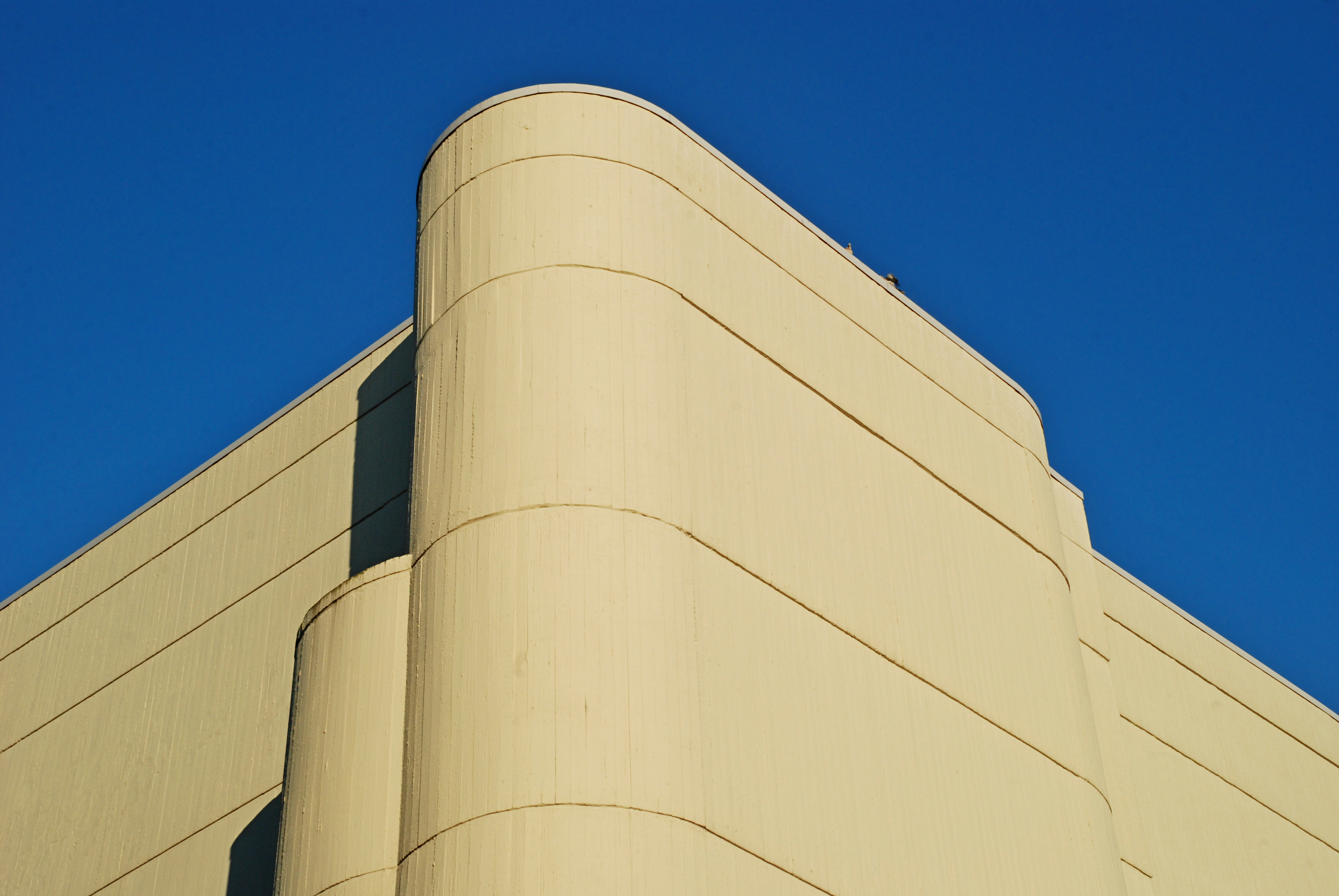 Belgique - Louvain-la-Neuve - Place des Sciences - Auditoires des Sciences This photo of immovable heritage has been taken in the Walloon Region